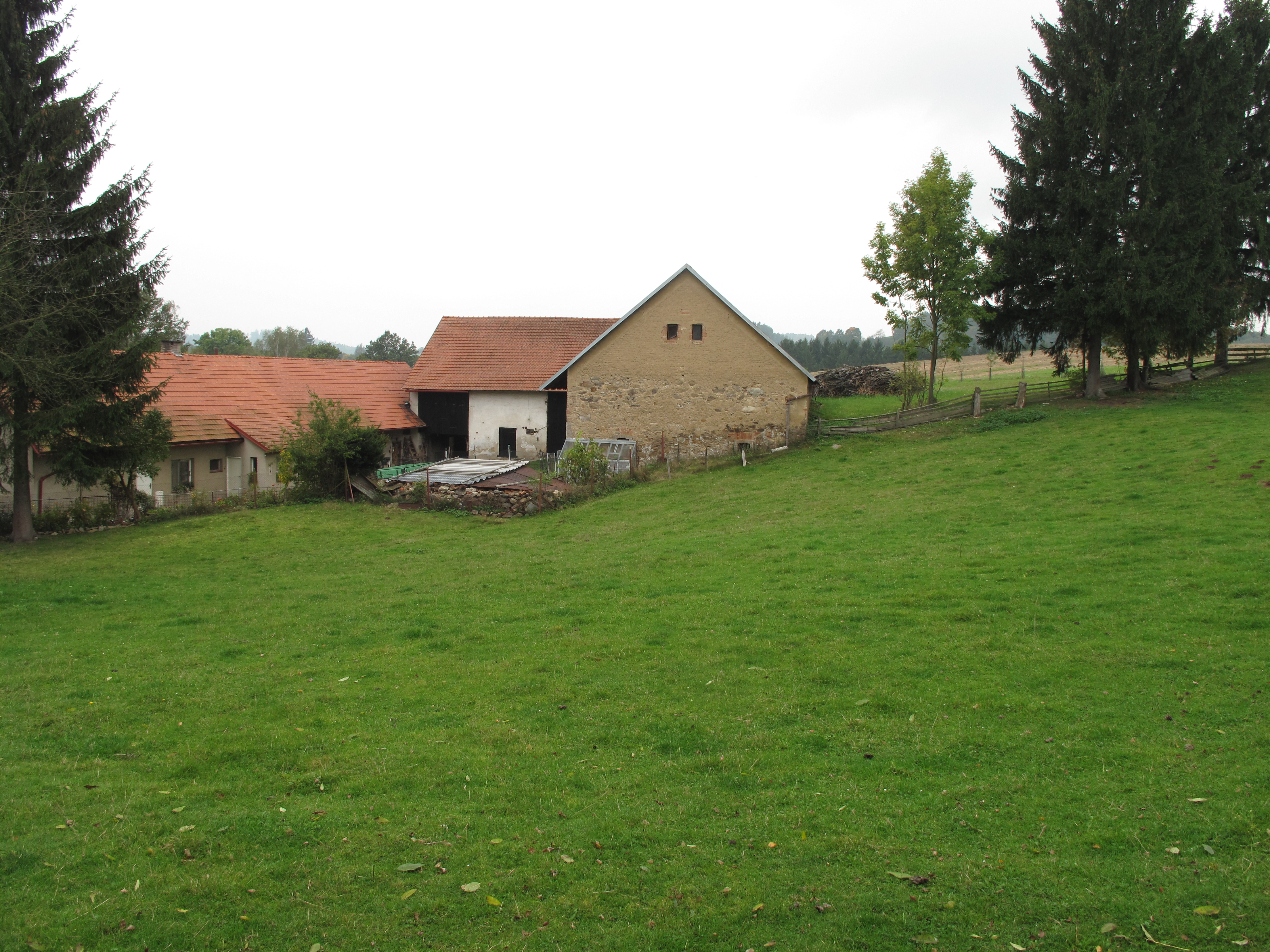 Pastvina v Kondraticích. Okres Benešov, Česká republika.